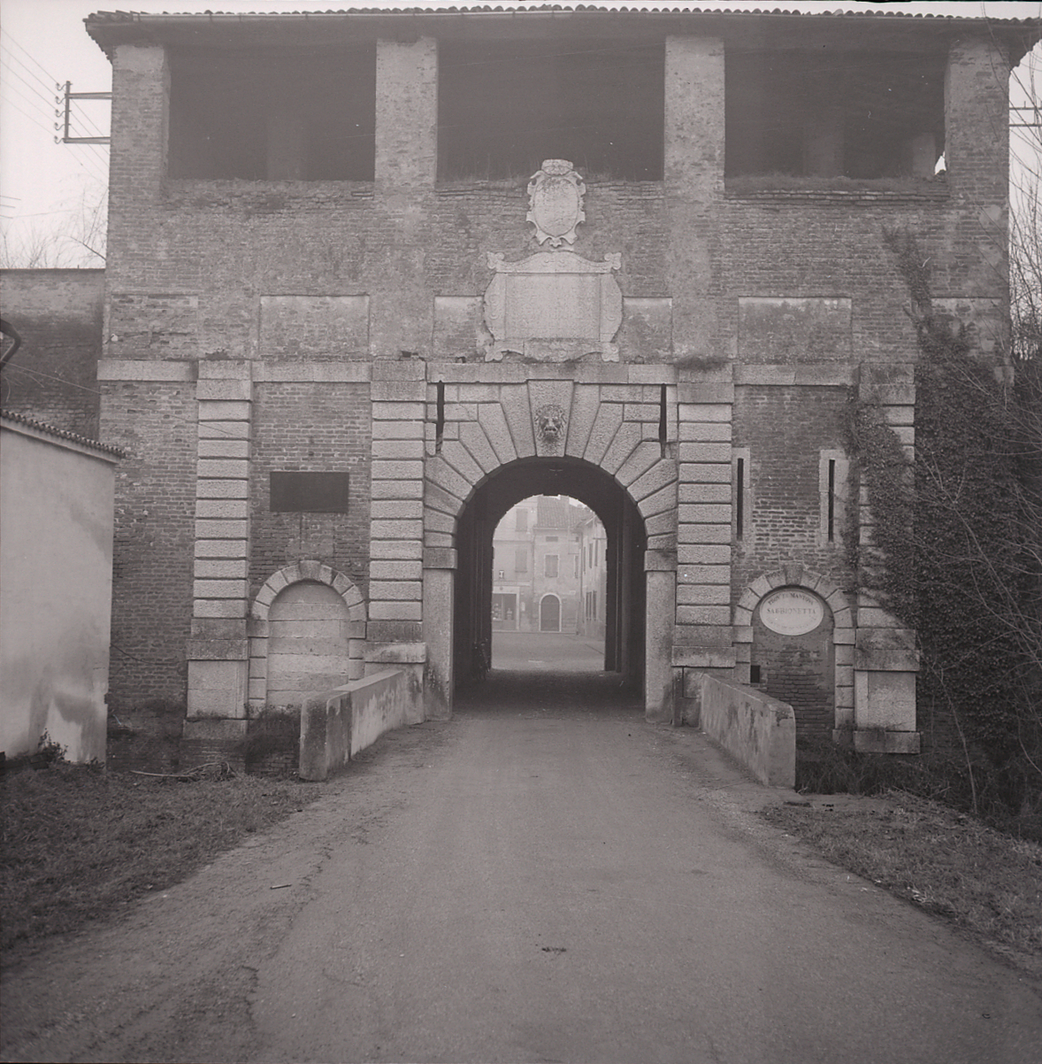 Sabbioneta. Architettura e particolari. Serie fotografica : Sabbioneta, 1965 / Paolo Monti. - Buste: 6, Fototipi: 6 : Negativo b/n, gelatina bromuro d'argento/ pellicola ; 6x6. - ((Serie costituita da 6 negativi identificati con la numerazione: 3759-3764. Sulla busta R3750 manoscritto: "Sabbioneta". La suddetta serie è contenuta nella scatola identificata con la numerazione R3499/3788. Sul coperchio iscrizione manoscritta a pennarello: "1 Località varie". - Occasione: Documentazione per la pubblicazione: Emilio CECCHI, Natalino SAPEGNO (a cura di), Storia della Letteratura Italiana, 9 voll., Milano, Garzanti, 1966 e segg. - Fonte: Monografia di Cecchi Emilio, Sapegno Natalino (a cura di): Storia della Letteratura Italiana, 9 voll., Milano, Garzanti (1966 e segg.)